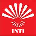 Perhimpunan Indonesia Tionghoa